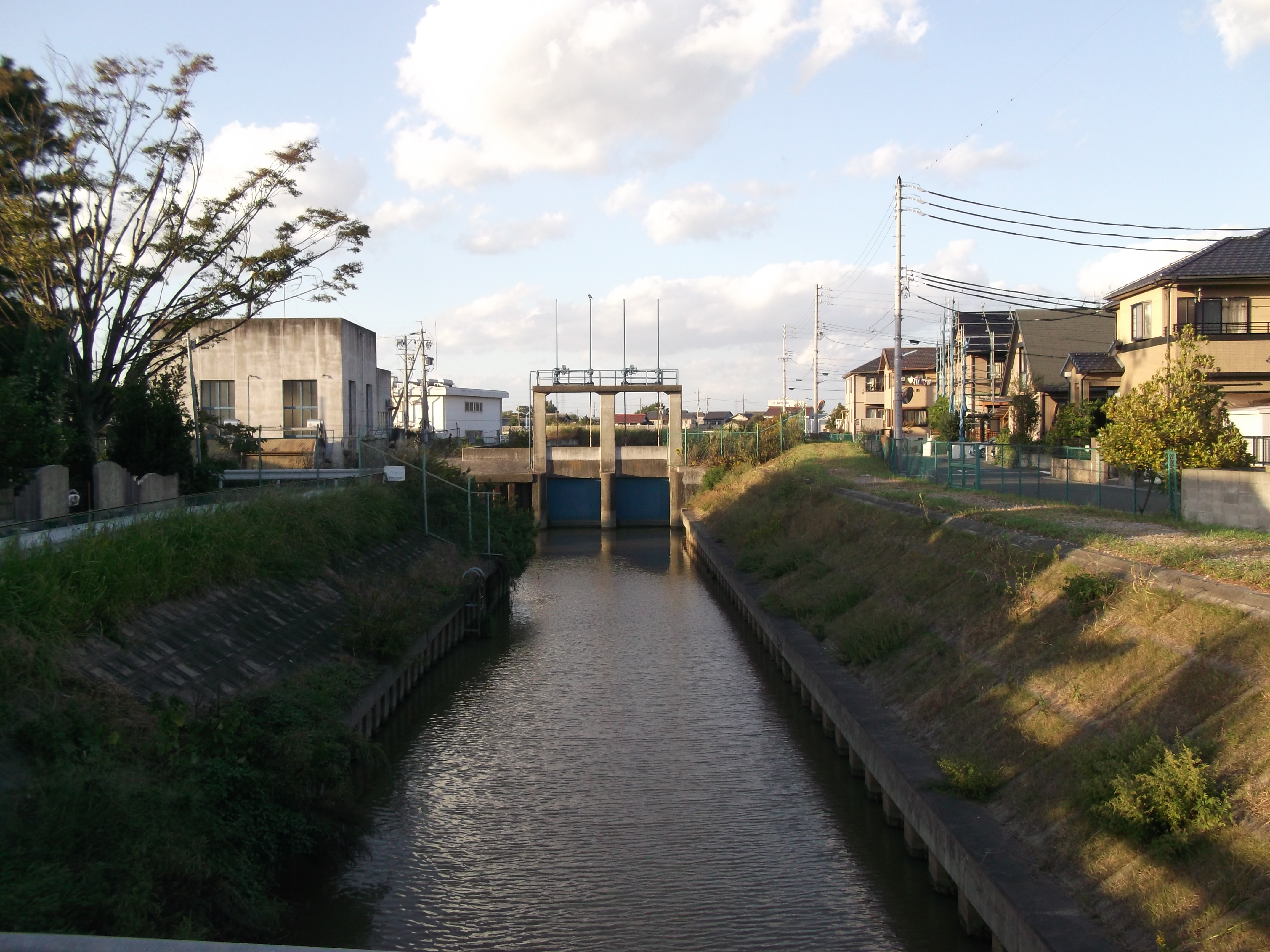 愛西市町方町に所在する根高排水機場